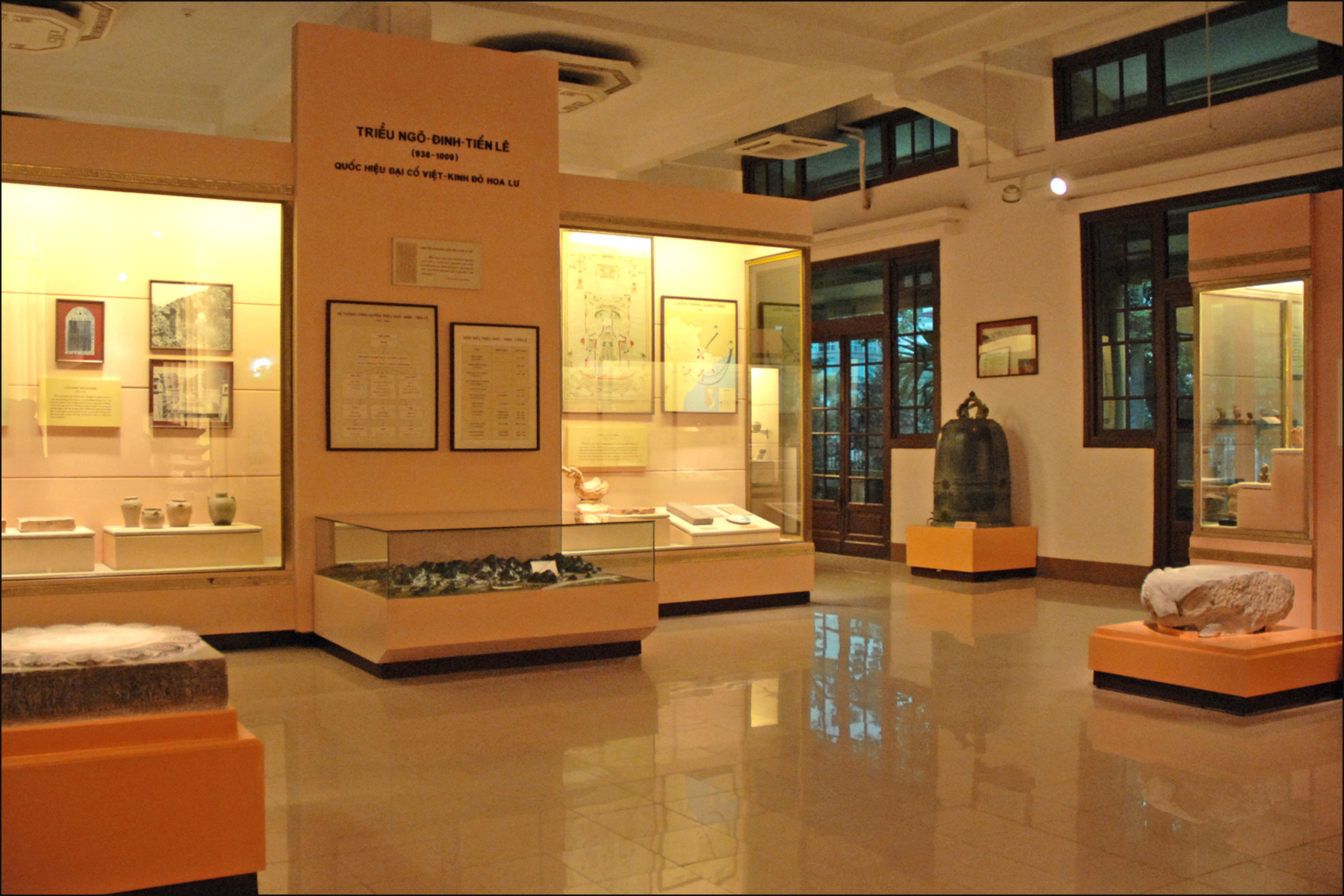 Salle présentant des objets (dont des pièces de monnaie de 968, en bronze) de la dynastie des Dinh. Cette dynastie a été la première à battre monnaie. Le Musée d'histoire de Hanoi est installé dans un bâtiment colonial, qui a abrité l'Ecole française d’Extrême-Orient dans les années 1930. Il renferme une importante collection d'objets, issus de différentes époques : depuis les origines du Vietnam jusqu’à la déclaration d’indépendance du pays au milieu du 20ème siècle. Les collections sont exposées, par ordre chronologique, sur 2 000 m² de salles d’exposition disposées sur plusieurs niveaux.